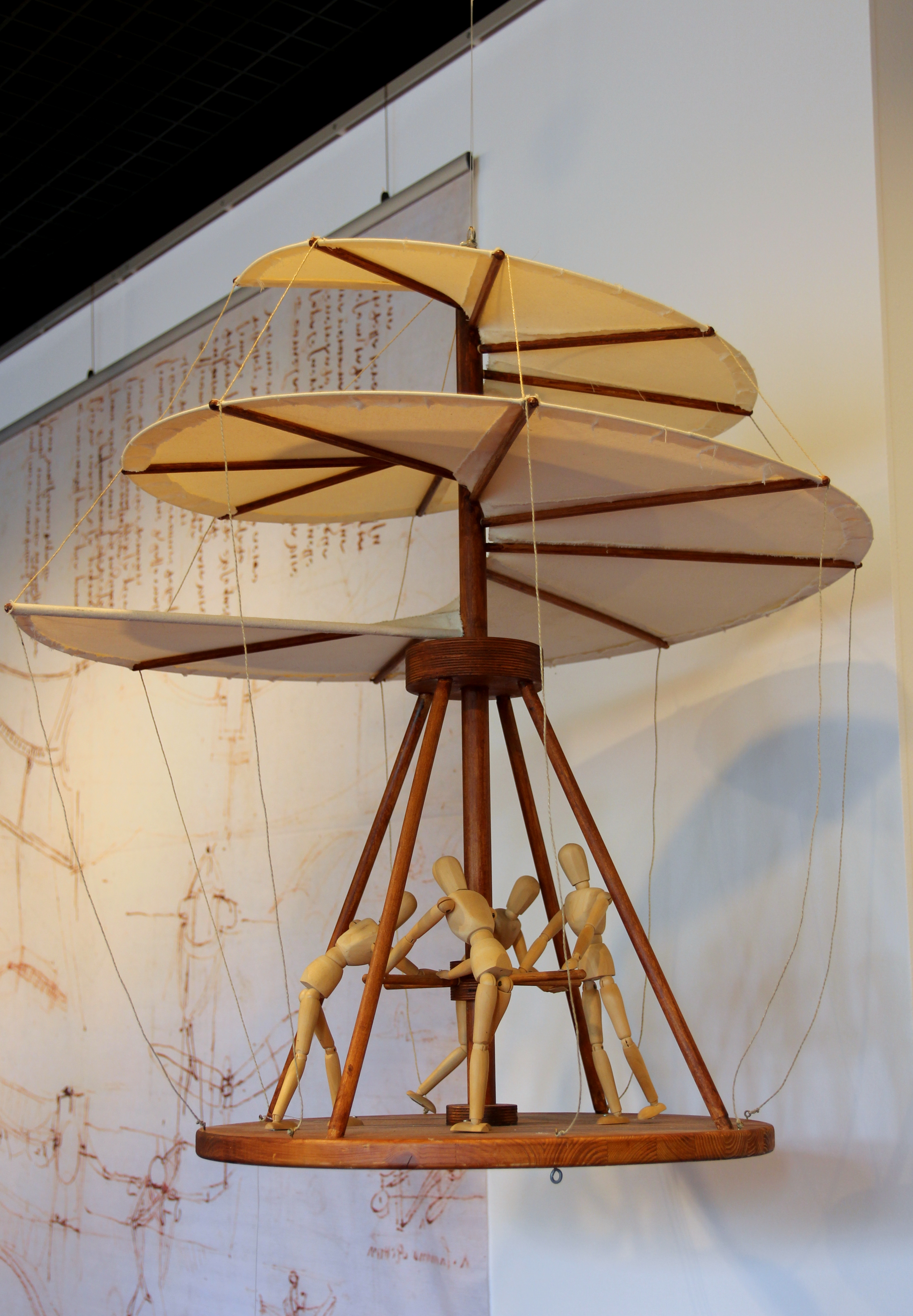 Deutsches Museum Bonn. GLAM.